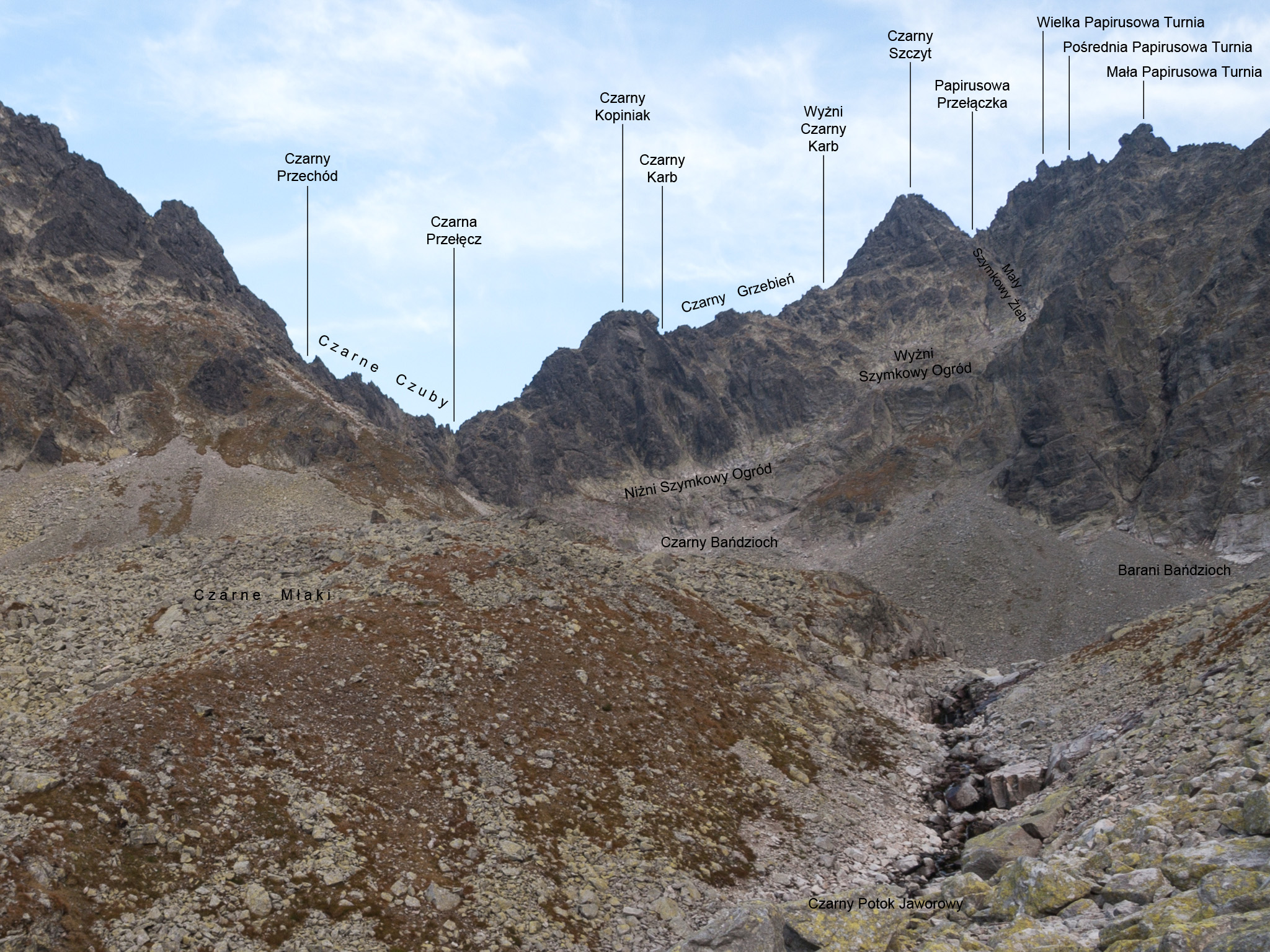 Czarna Przełęcz, Czarny Szczyt i Papirusowe Turnie – widok z górnego piętra Doliny Czarnej Jaworowej.